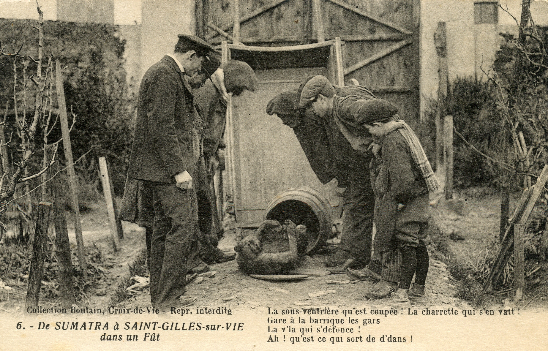 Carte postale, conte des « Buveurs d'eau-de-vie-de-singe », no 6. De Sumatra à Saint-Gille-sur-Vie dans un fût. Collection Boutain, Croix-de-Vie. Phototypie.